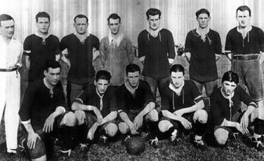 Club Atlético Independiente squad.